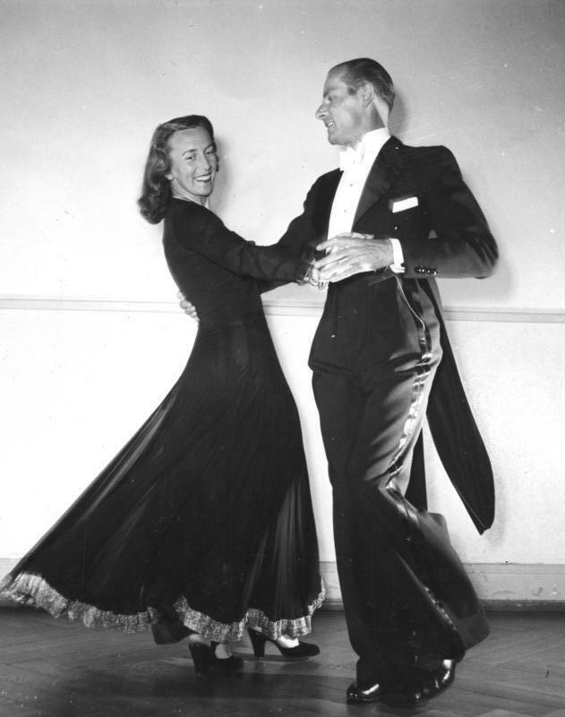 Deutscher Meister 1949 Auf der Frühjahrstagung der deutschen Tanzlehrerschaft in Bad Kissingen errang das Hamburger Ehepaar Heinrici den Titel "Deutscher Meister 1949". Unser Bild zeigt das Hamburger Paar Heinrici beim Tanz 13-6-49 3457-49 Illus-dpd